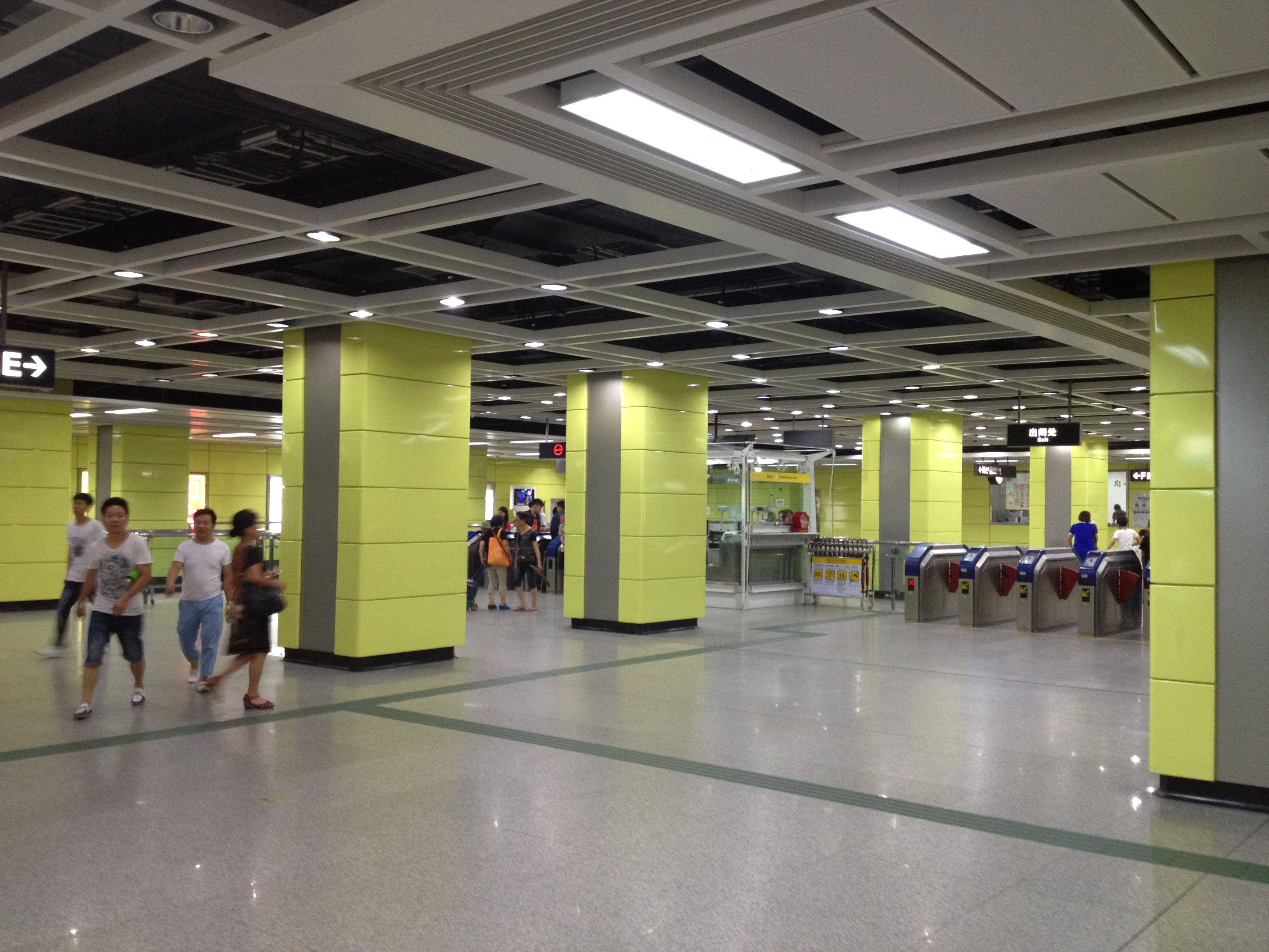 广州地铁沥滘站北站厅